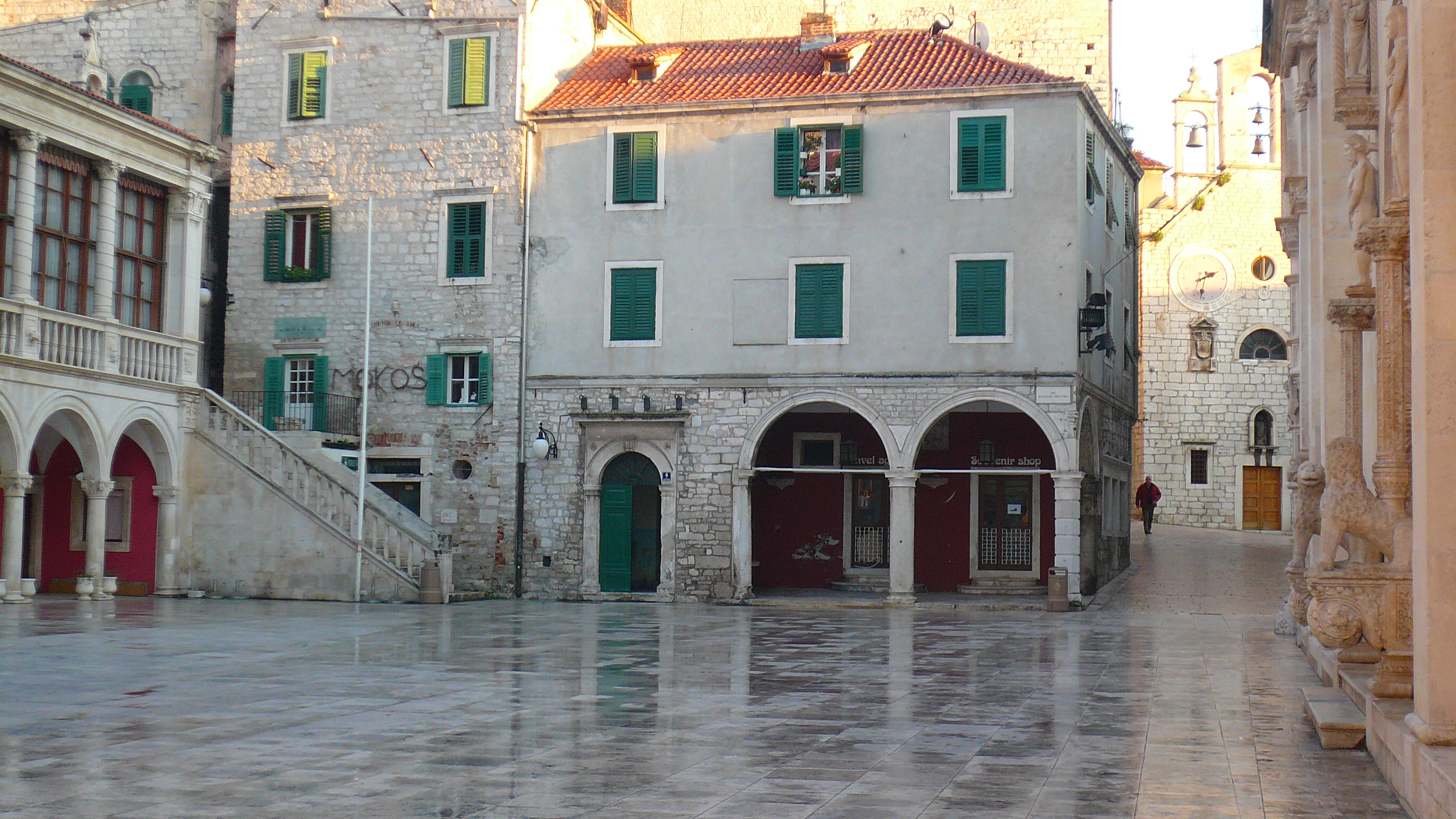 Trip to Croatia-Day 6-Zadar-Sibenik 9